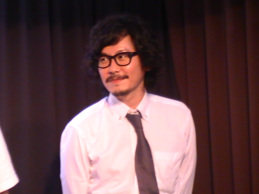 マツモトクラブ (2017年5月22日)